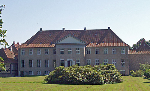 Skjoldenæsholm er en hovedgård i Valsølille Sogn, Ringsted Kommune , Denmark